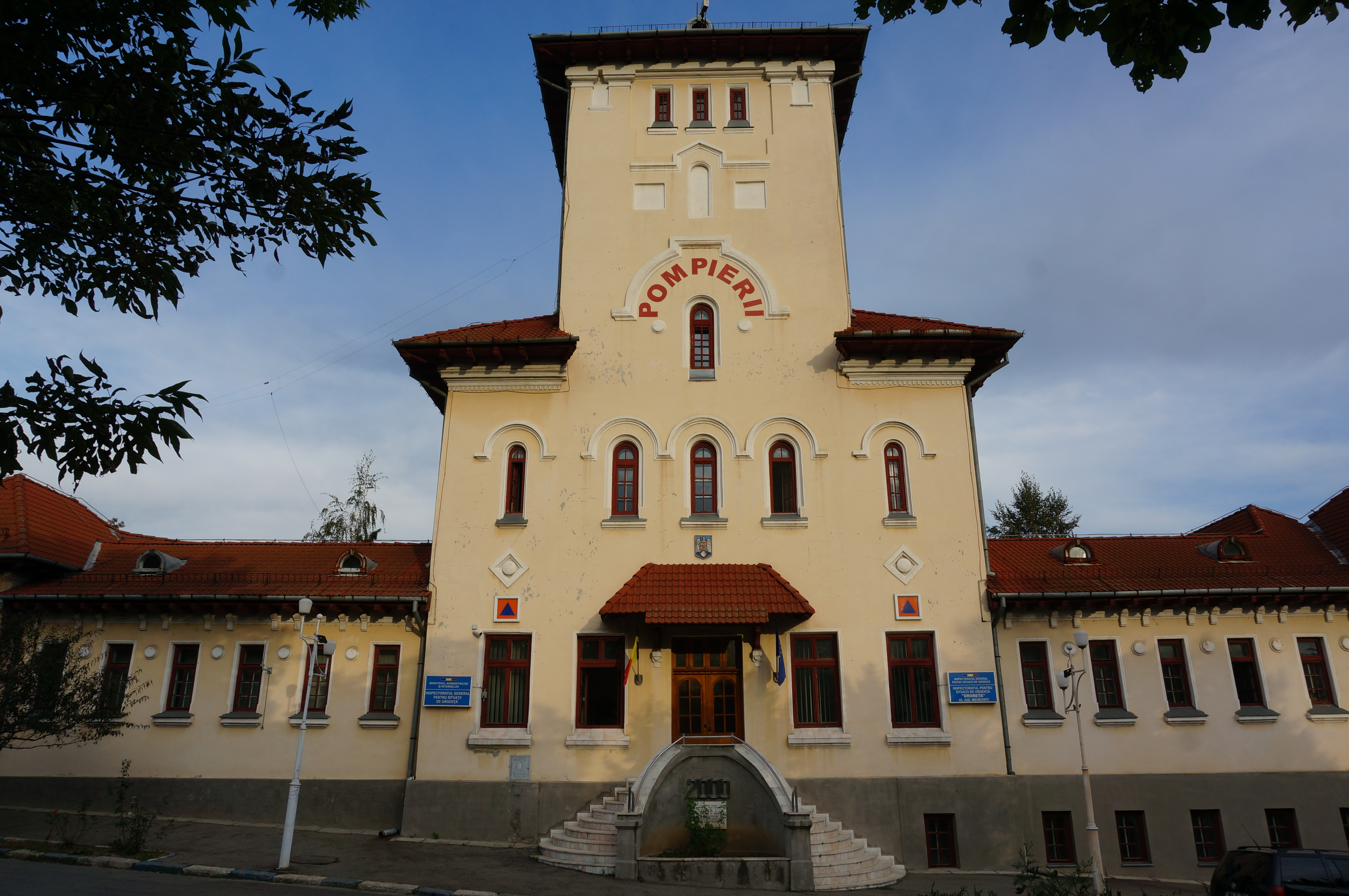 une vue de la caserne de pompier.